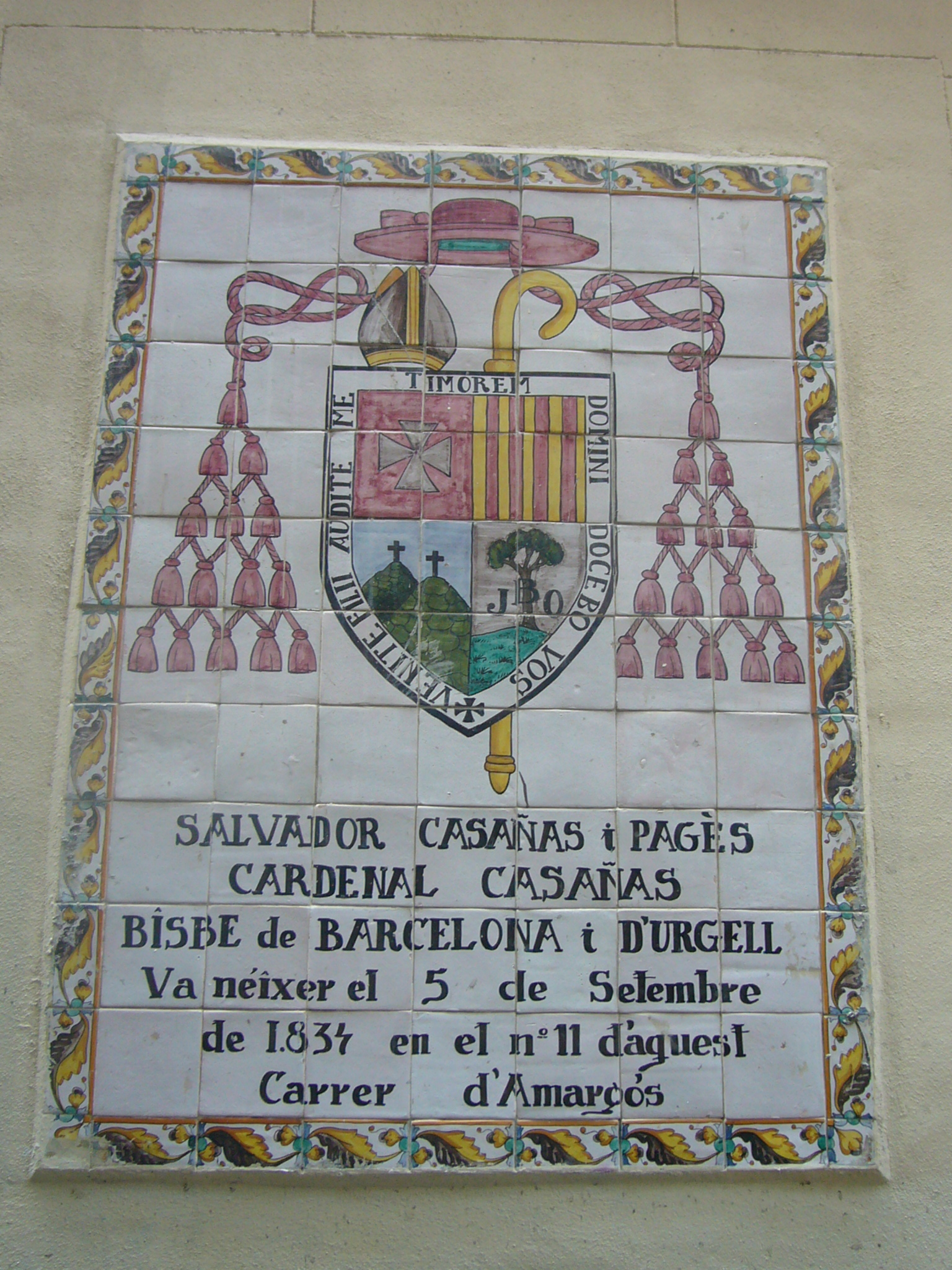 Placa al carrer d'Amargós 11, casa natal del cardenal Sasañas